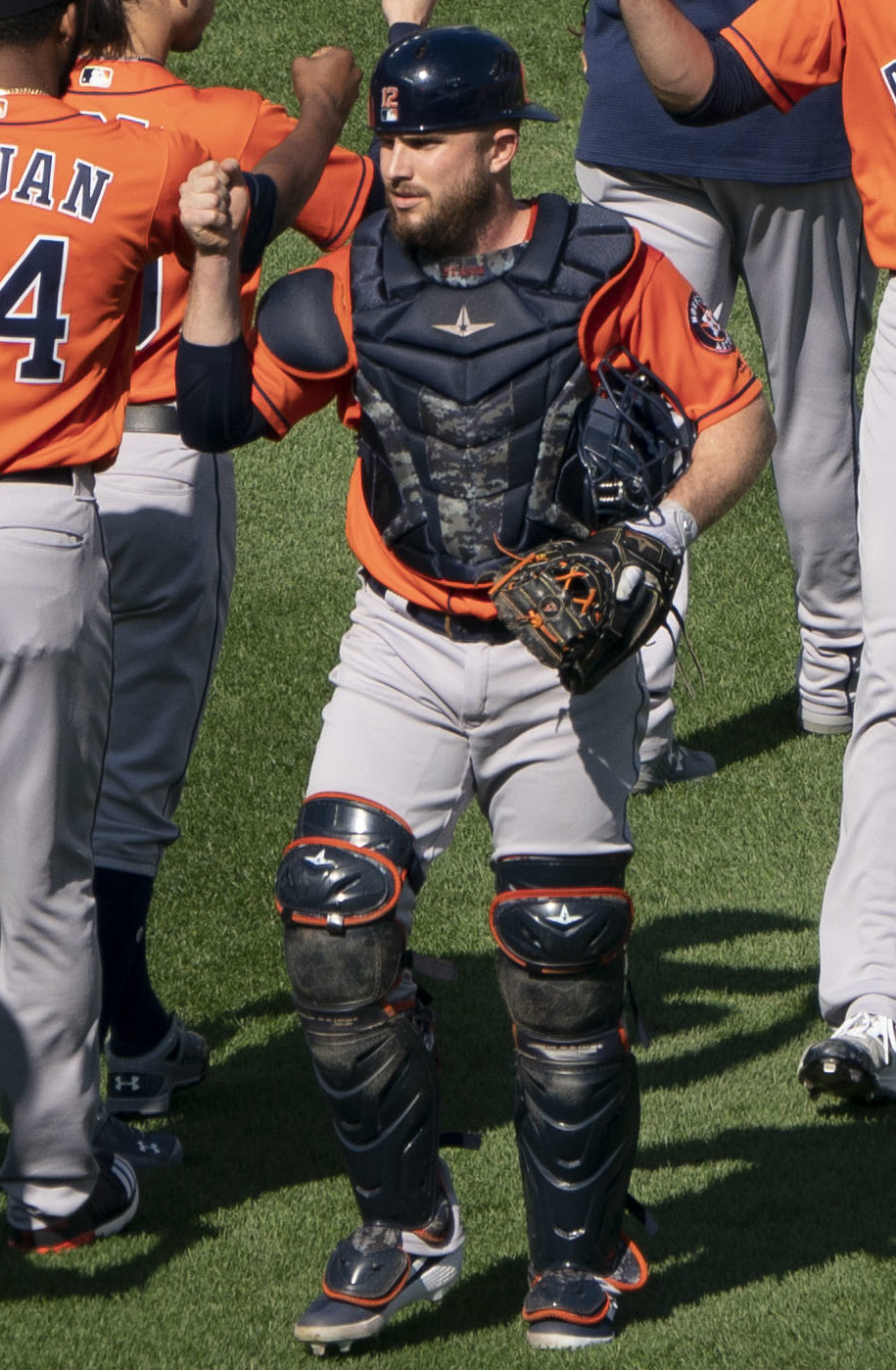 Astros at Orioles 09/30/18